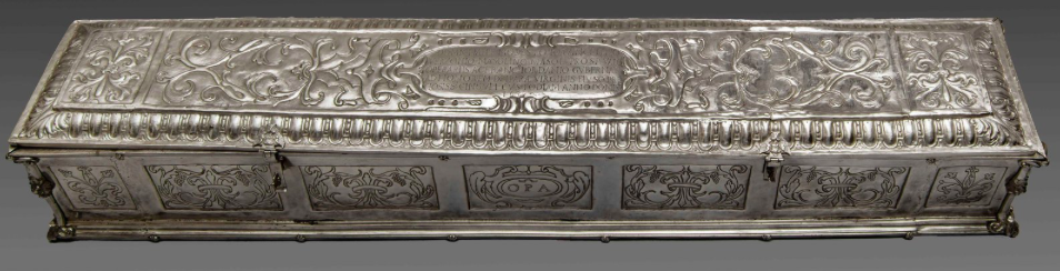 Teca Sacra Cintola di Salvestro Mascagni 1633 Duomo di Prato